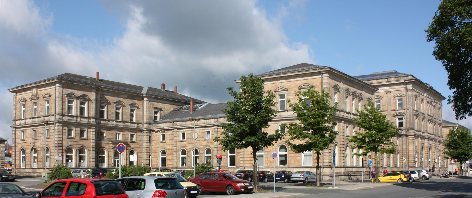 Empfangsgebäude des Hofer Hauptbahnhofs von 1880